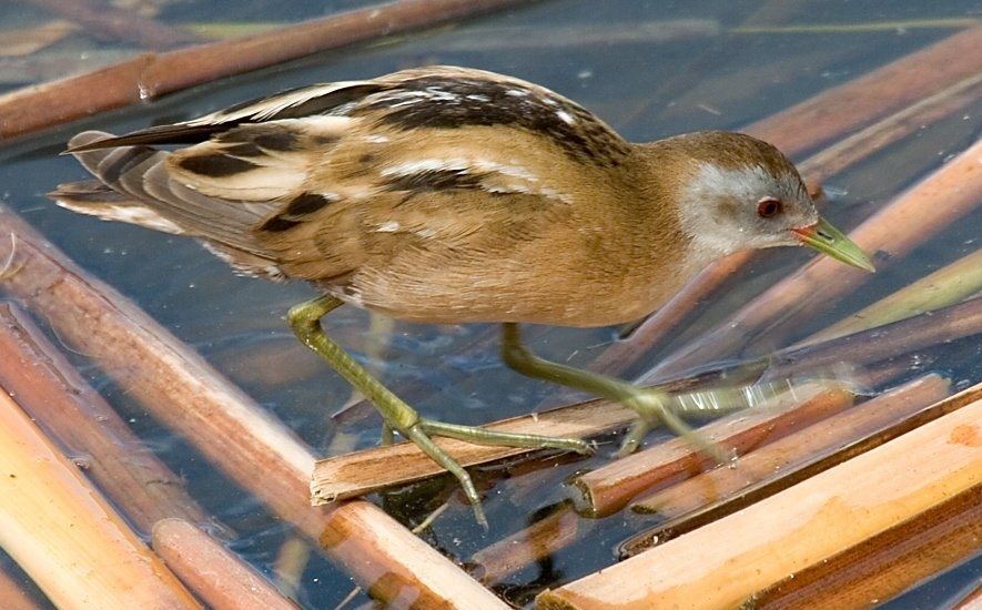 11404 Klein Waterhoen / Little Crake